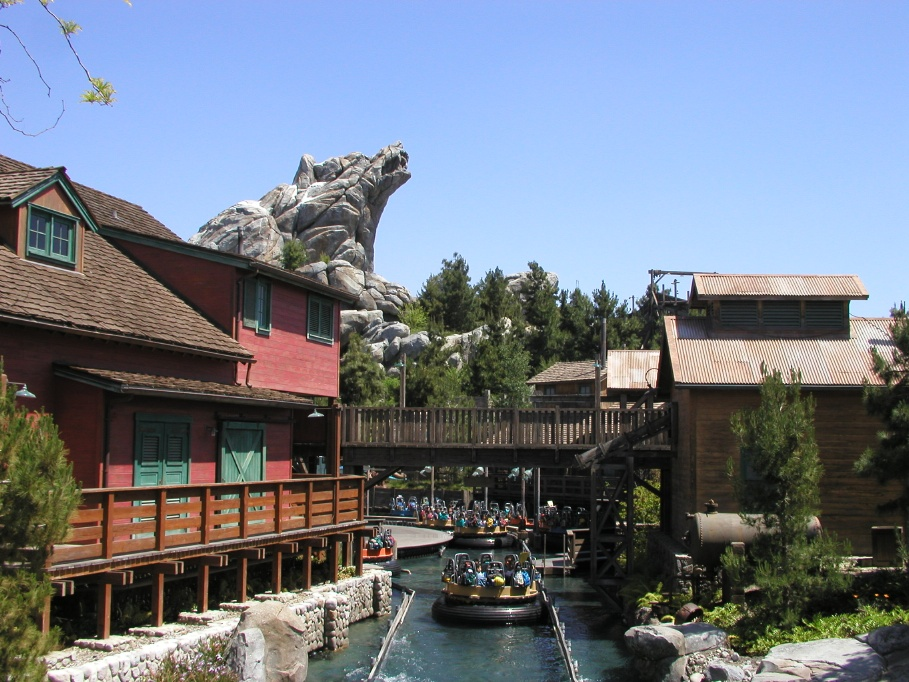 photo de Grizzly River Run importée depuis Wikipédia EN Image:Grizzly River Run.jpg